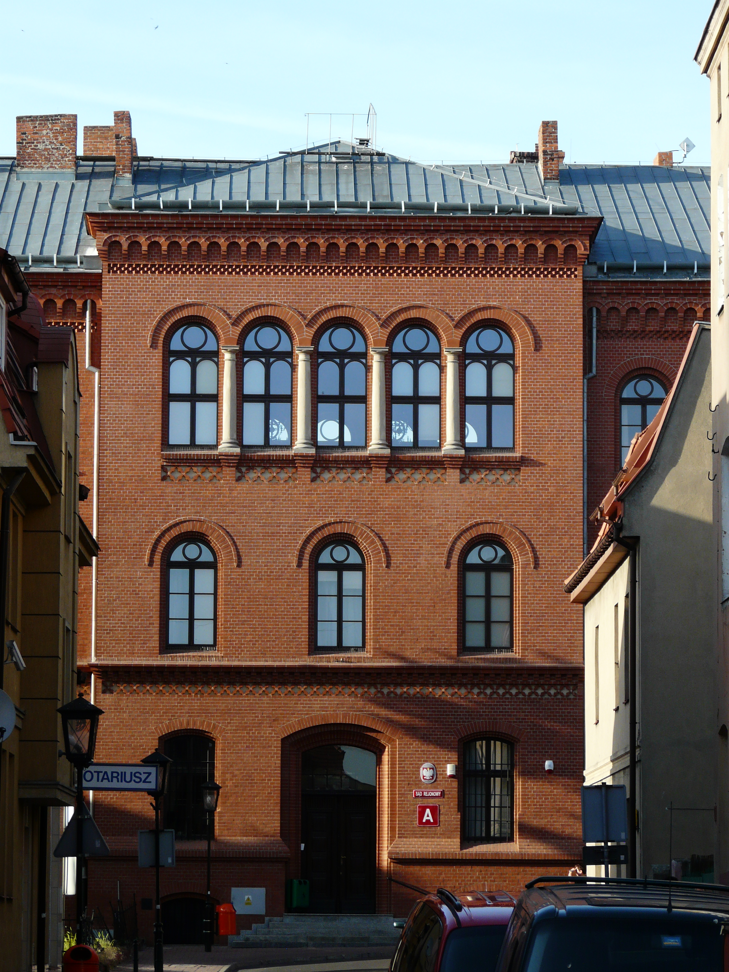 Gniezno, Poland